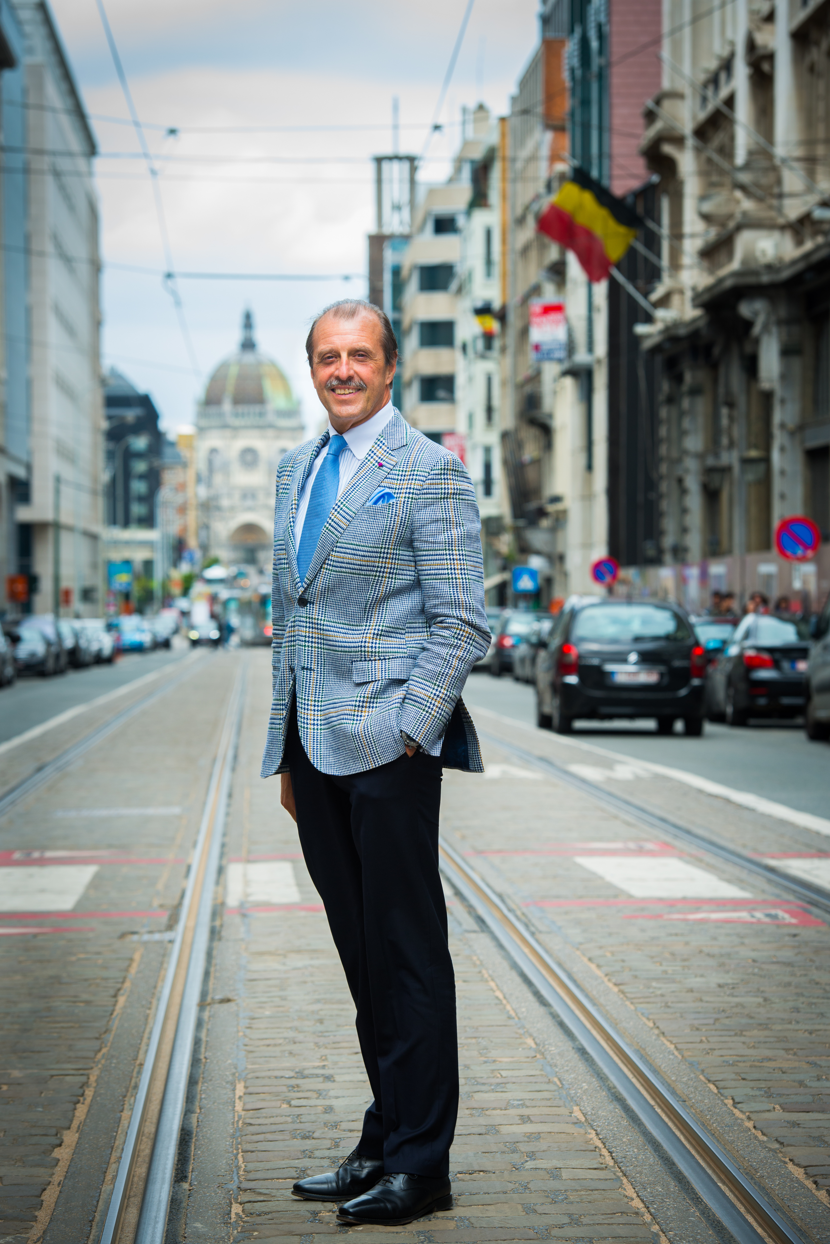 Paul Kumpen, Voorzitter Voka